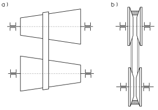 Wariatory pasowe